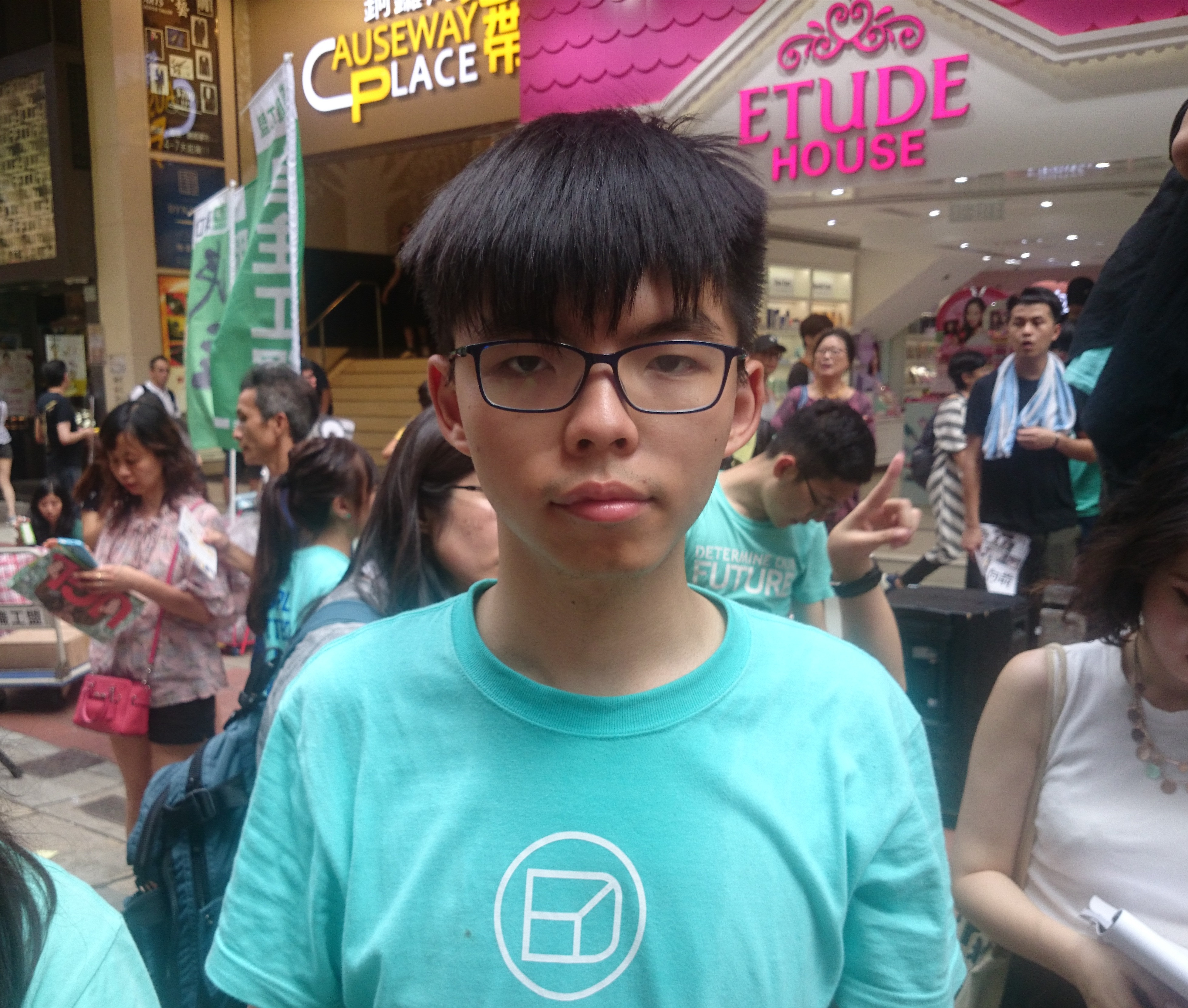 粵語: 黃之鋒企咗喺個眾志街站度。